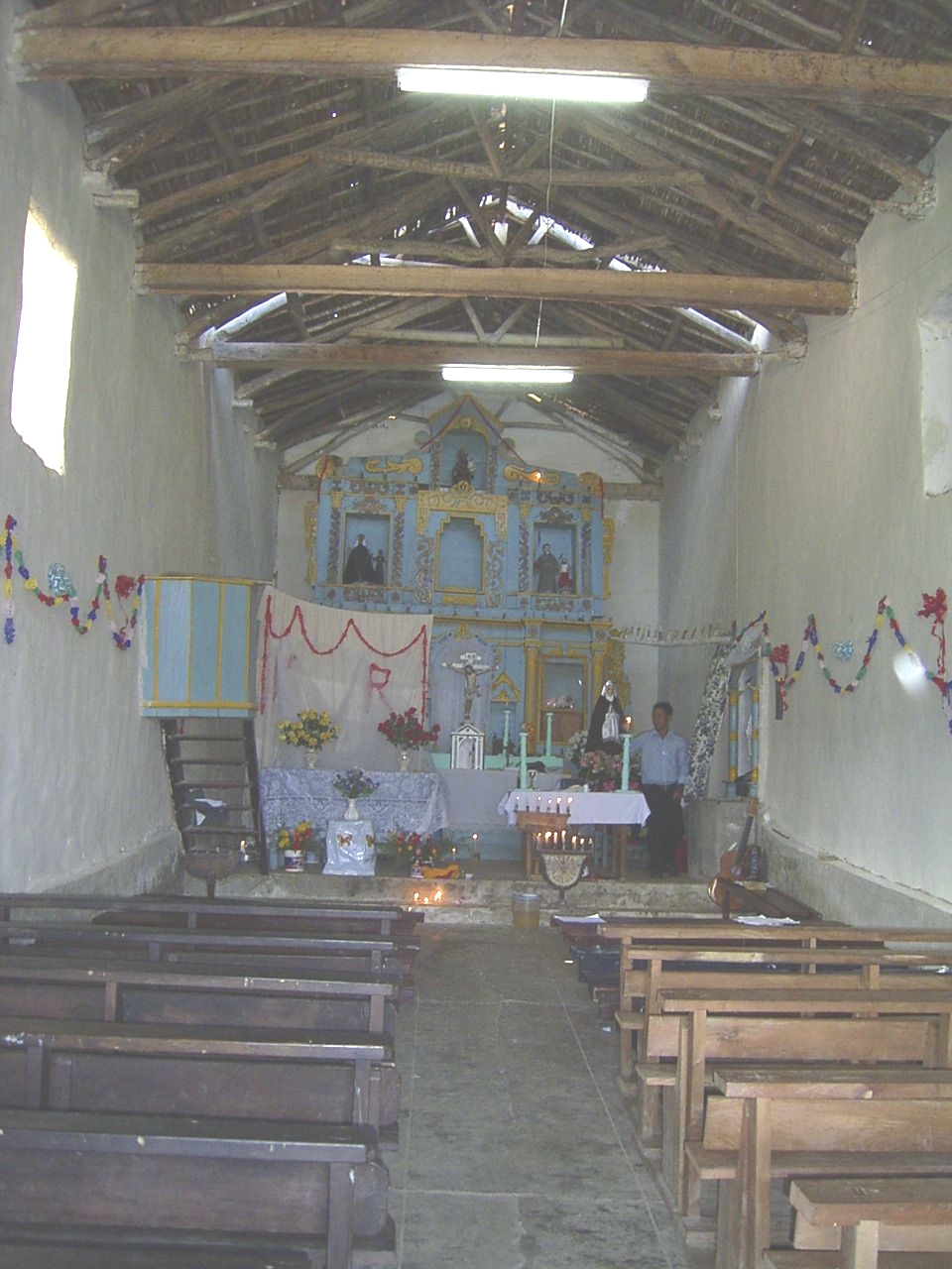 Plaza de Armas de Cocabamba, Luya, Amazonas, Peru